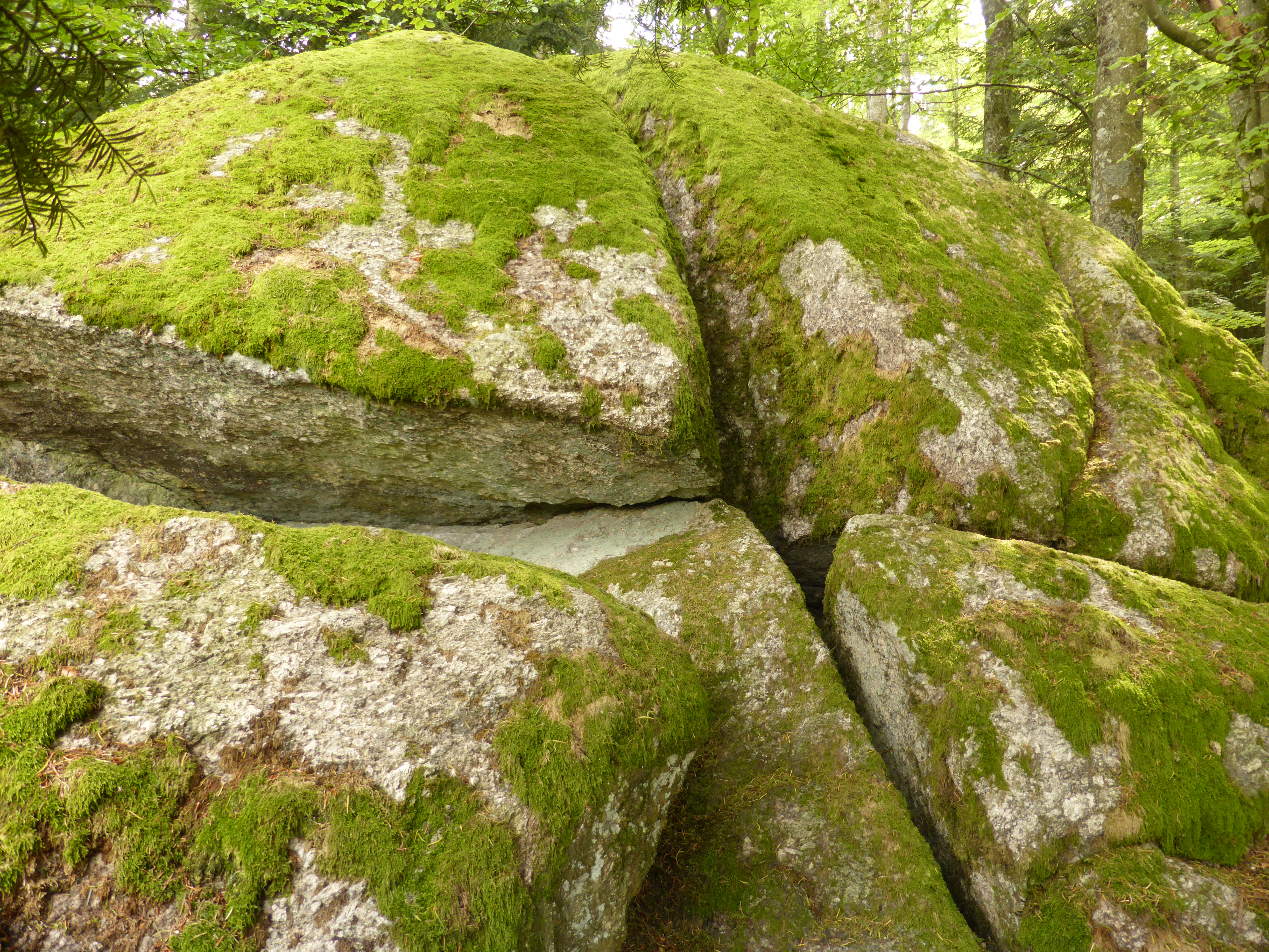 Felsformation am Geistlichen Stein nordwestlich der Ortschaft Ringelai. Geotop im Landkreis Freyung-Grafenau.